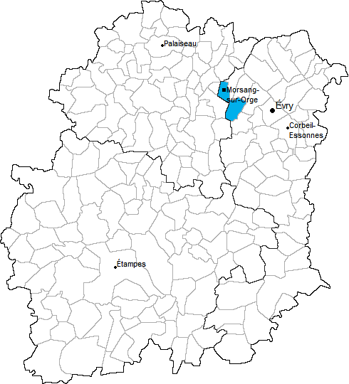 Carte de localisation du canton de Morsang-sur-Orge en Essonne (91)